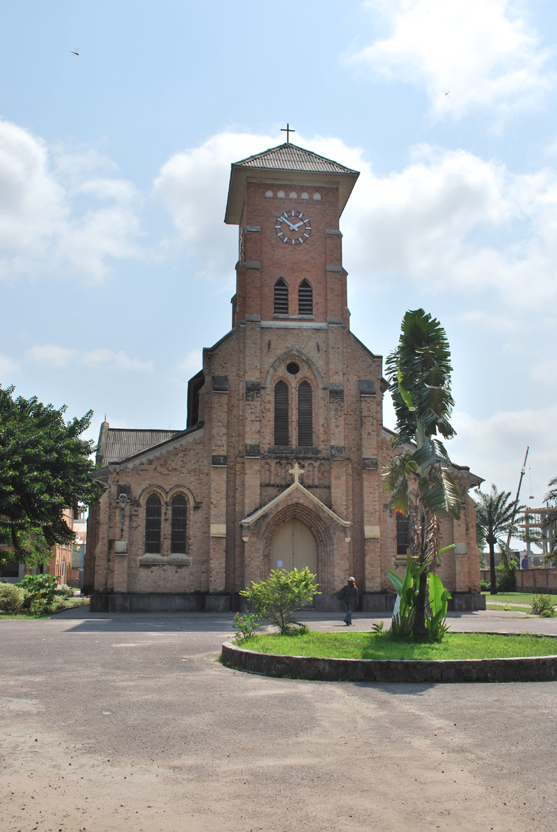 Preĝejo de Sankta Anna en Kinŝaso.